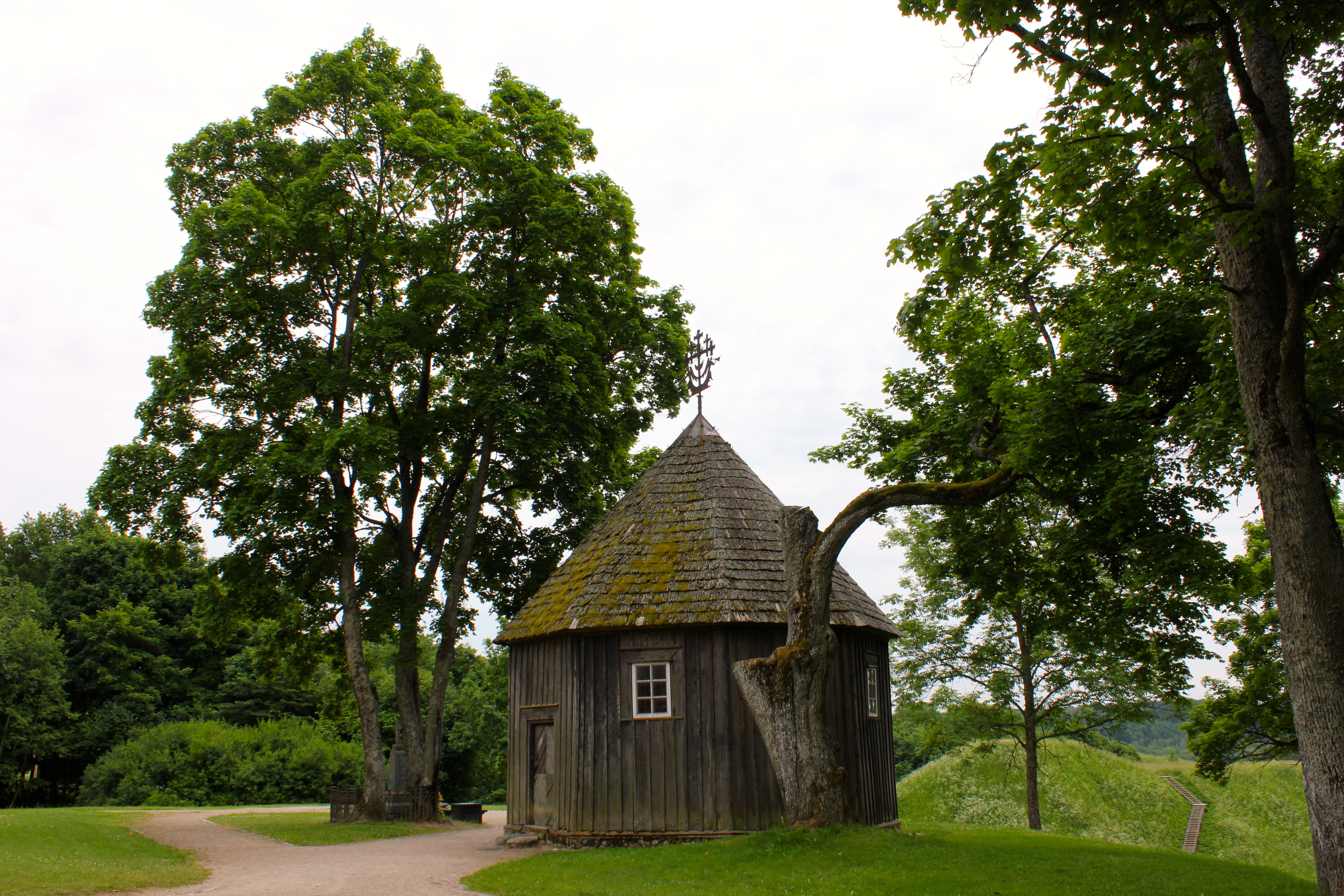 Kernavė